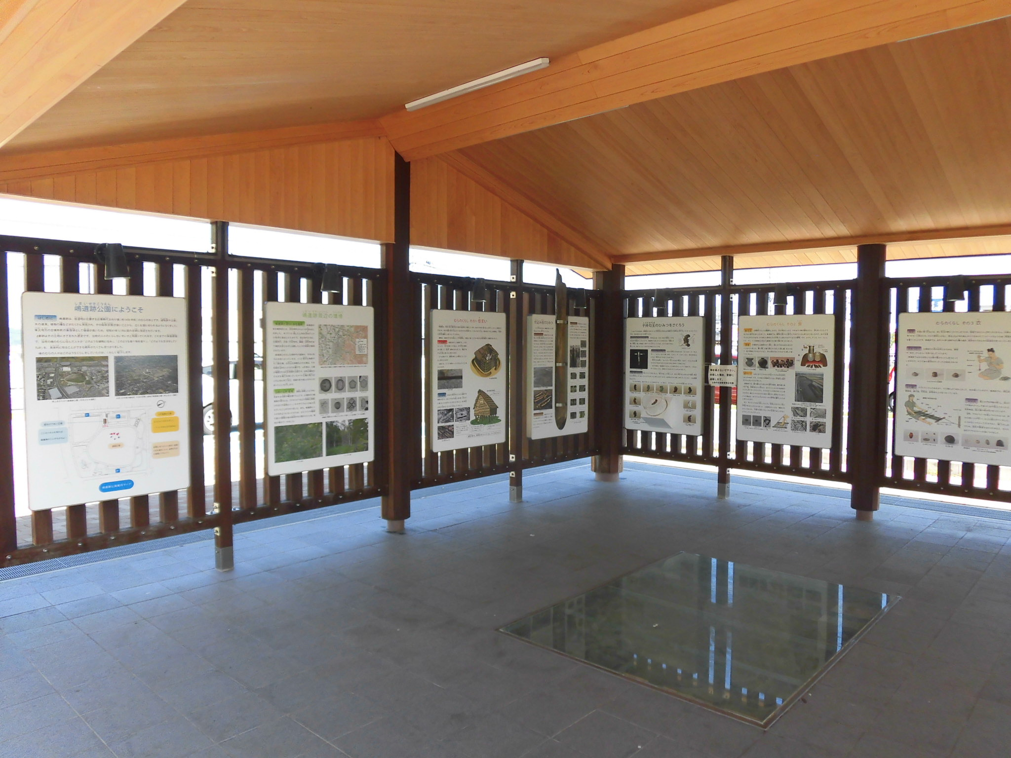 嶋遺跡公園。山形県山形市嶋。古墳時代後期の集落跡。国指定史跡。土地区画整理事業に伴い遺跡公園として整備。公園内の東屋に解説展示。